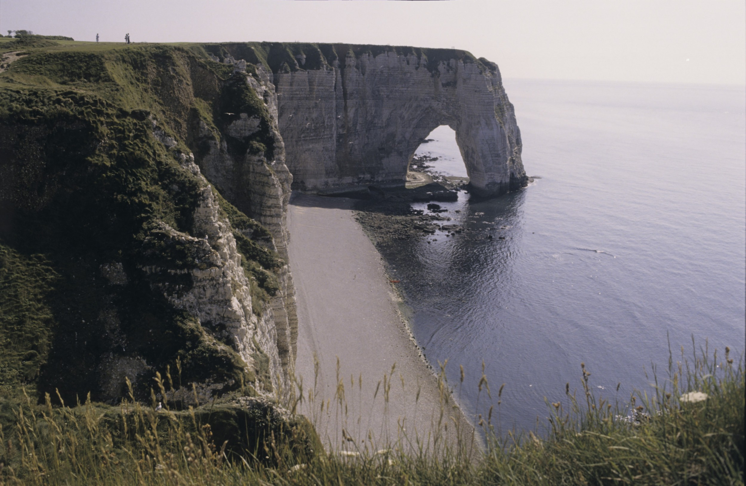 l'arche imposante de la Manneporte vue depuis en face. photo Samy 1982 diapo Licensing diapo Samy Ete 1982